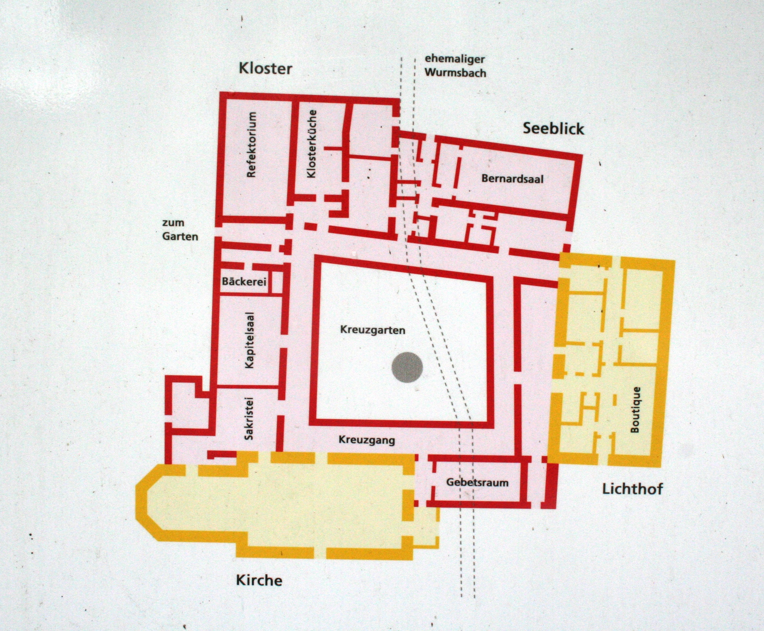 Kloster Wurmsbach: Übersichtsplan